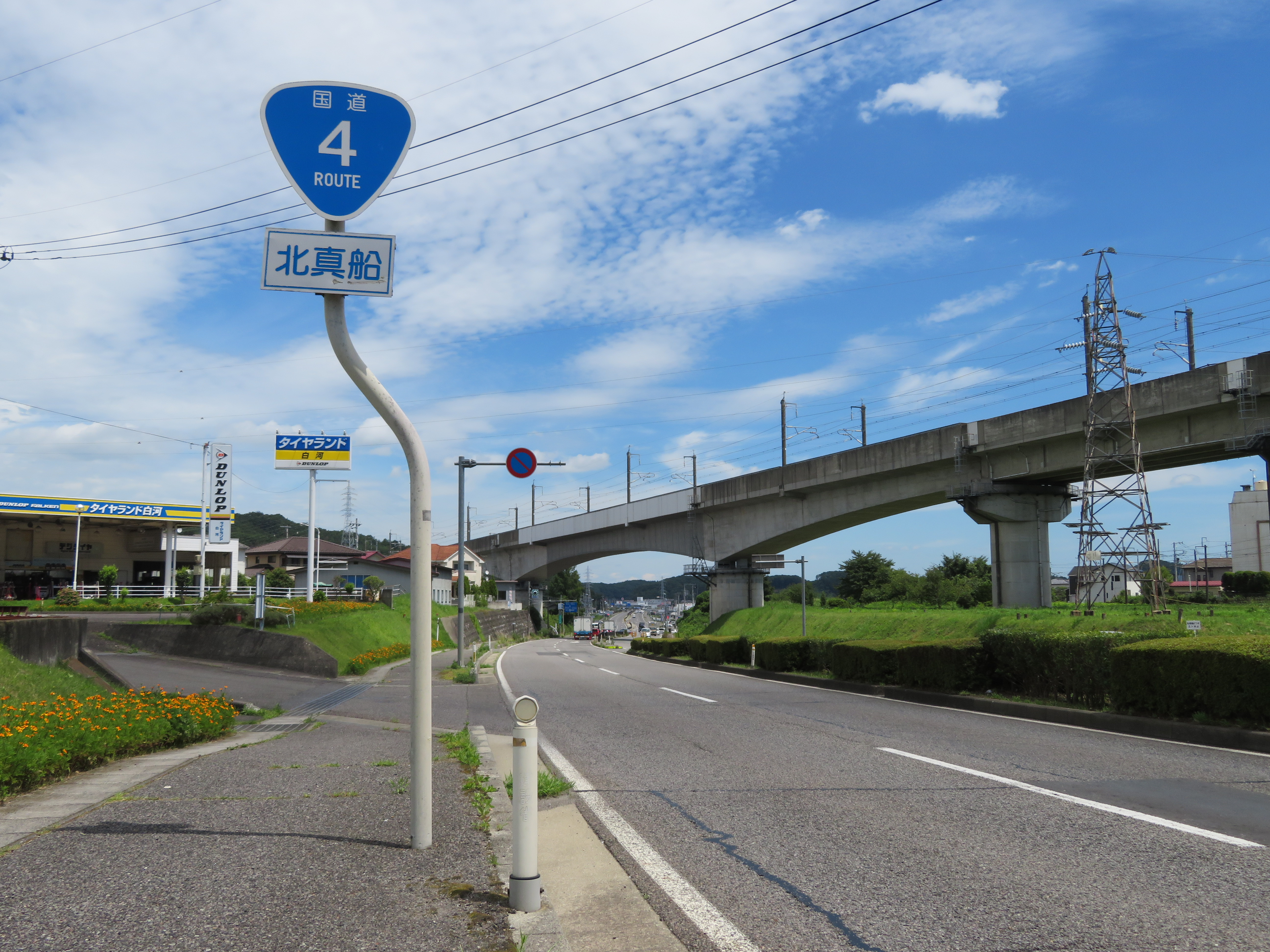 国道4号線福島県白河市北真船付近（郡山方面を撮影）